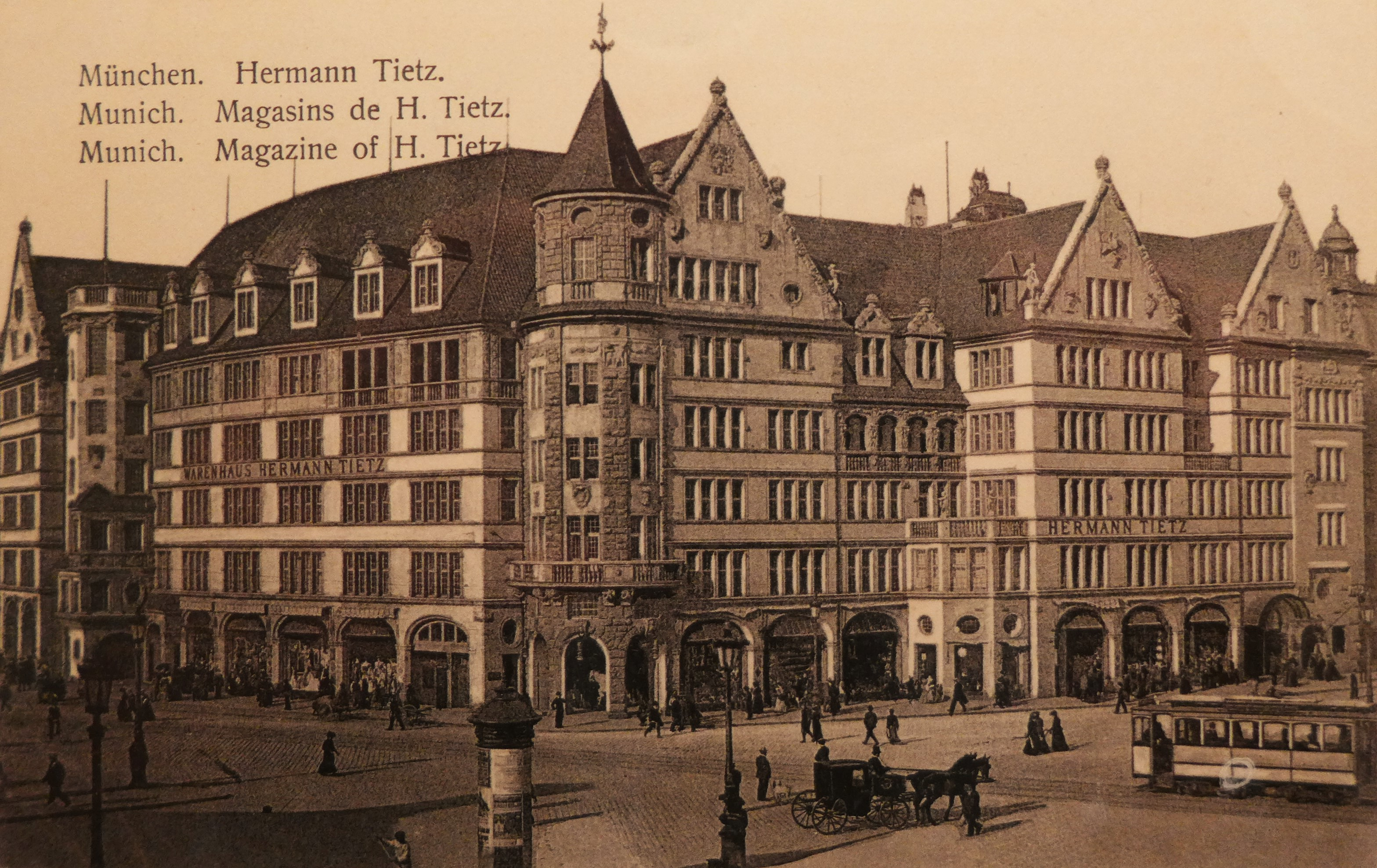 Das von Max Littmann entworfene und am 25. Februar 1905 eröffnete Kaufhaus Hermann Tietz am Münchener Bahnhofsvorplatz, Postkarte gelaufen 12. Februar 1909, Privatsammlung